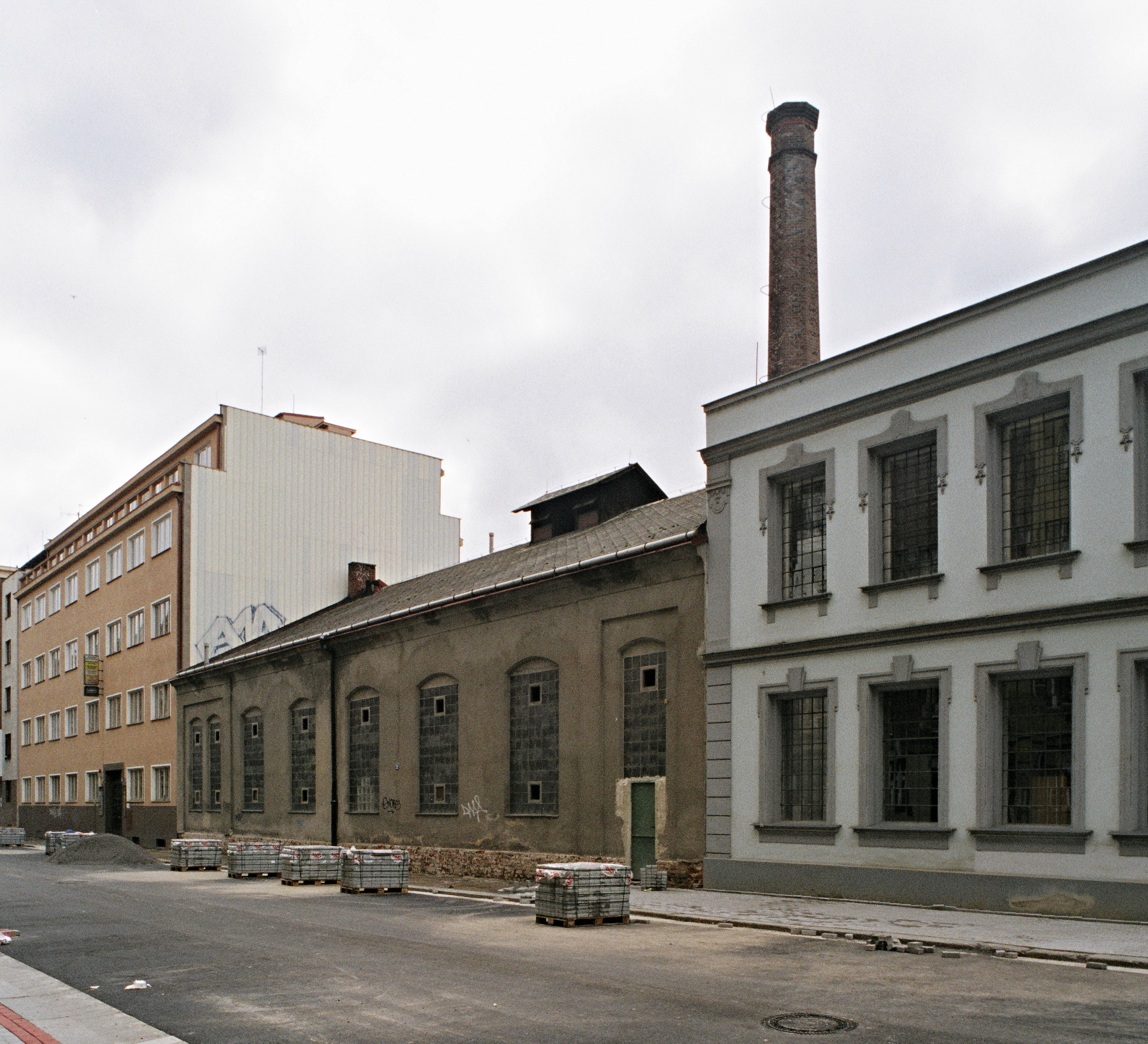 Bývalá slévárna umělecké litiny Karel Bendelmayer, Praha 7 - Holešovice, slévárenská hala do Přístavní ulice. Stav v roce 2005 před přestavbou.